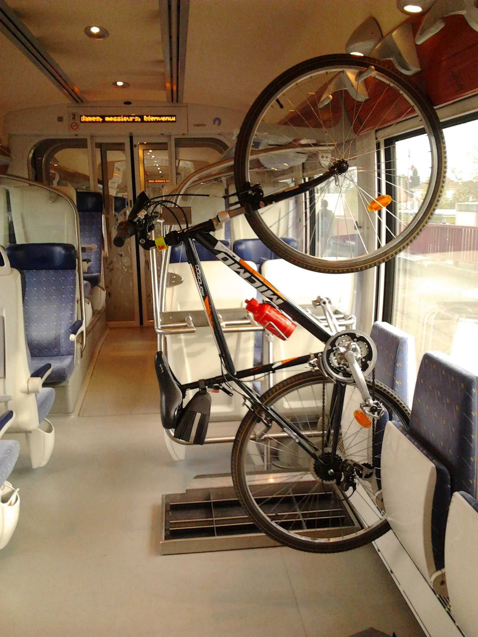 Un vélo accroché à bord d'un AGC (Autorail Grande Capacité) sur le réseau TER Alsace, le 27 avril 2012